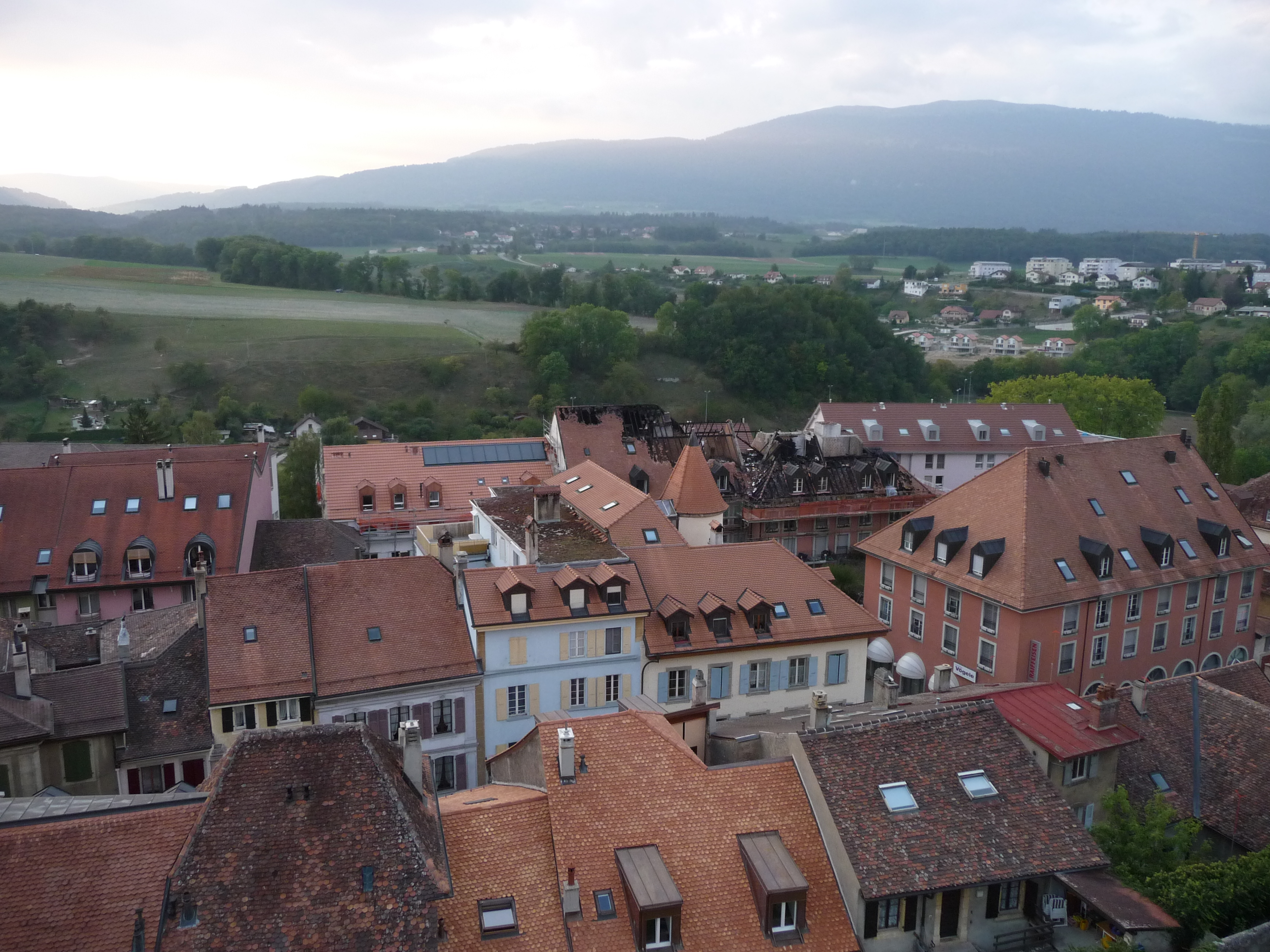 Orbe.